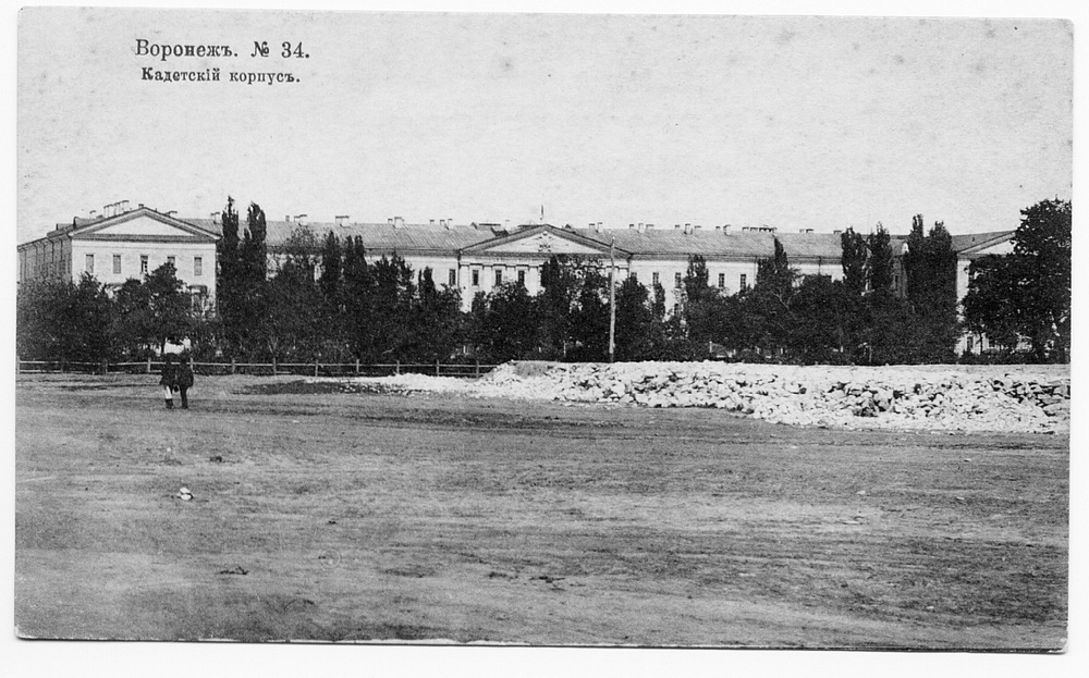 Кадетский корпус